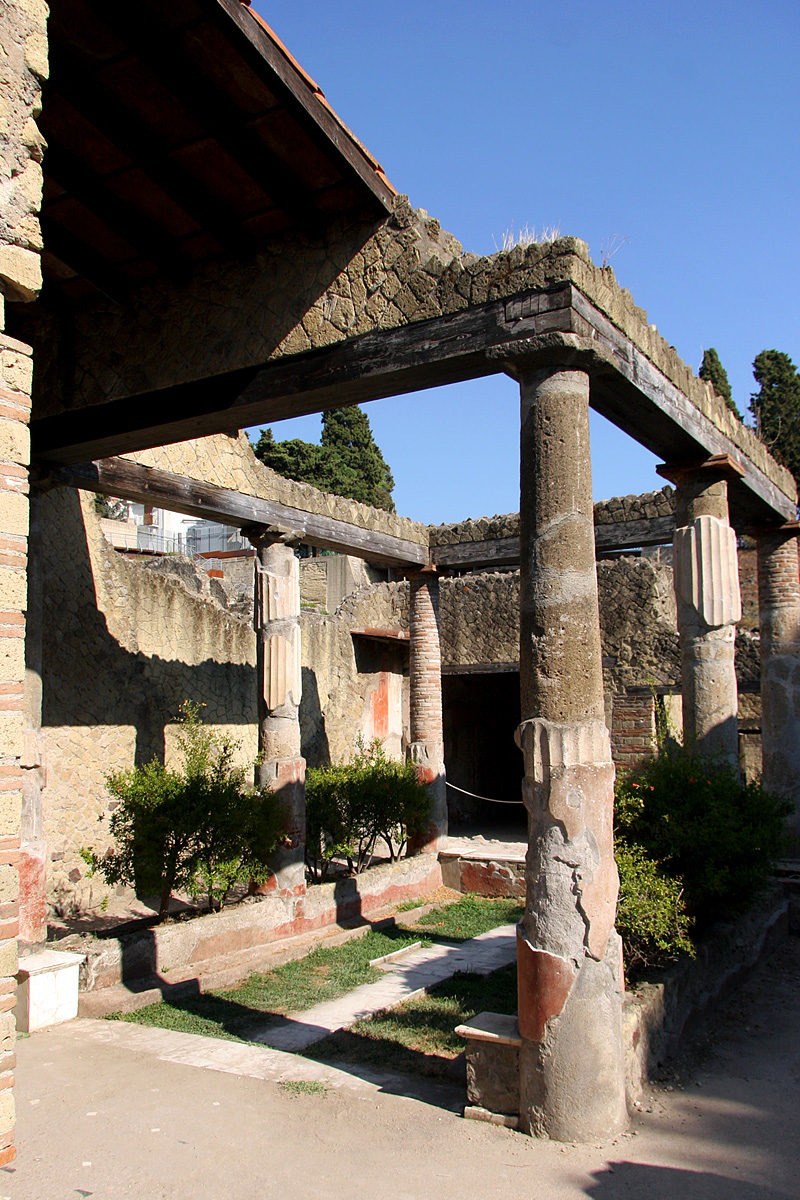 Casa del Atrio Corintio, Herculano.